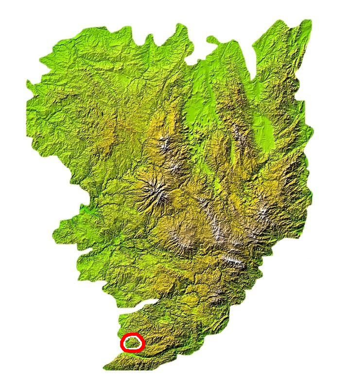 Situation du Sidobre sur la carte du Massif cenetral